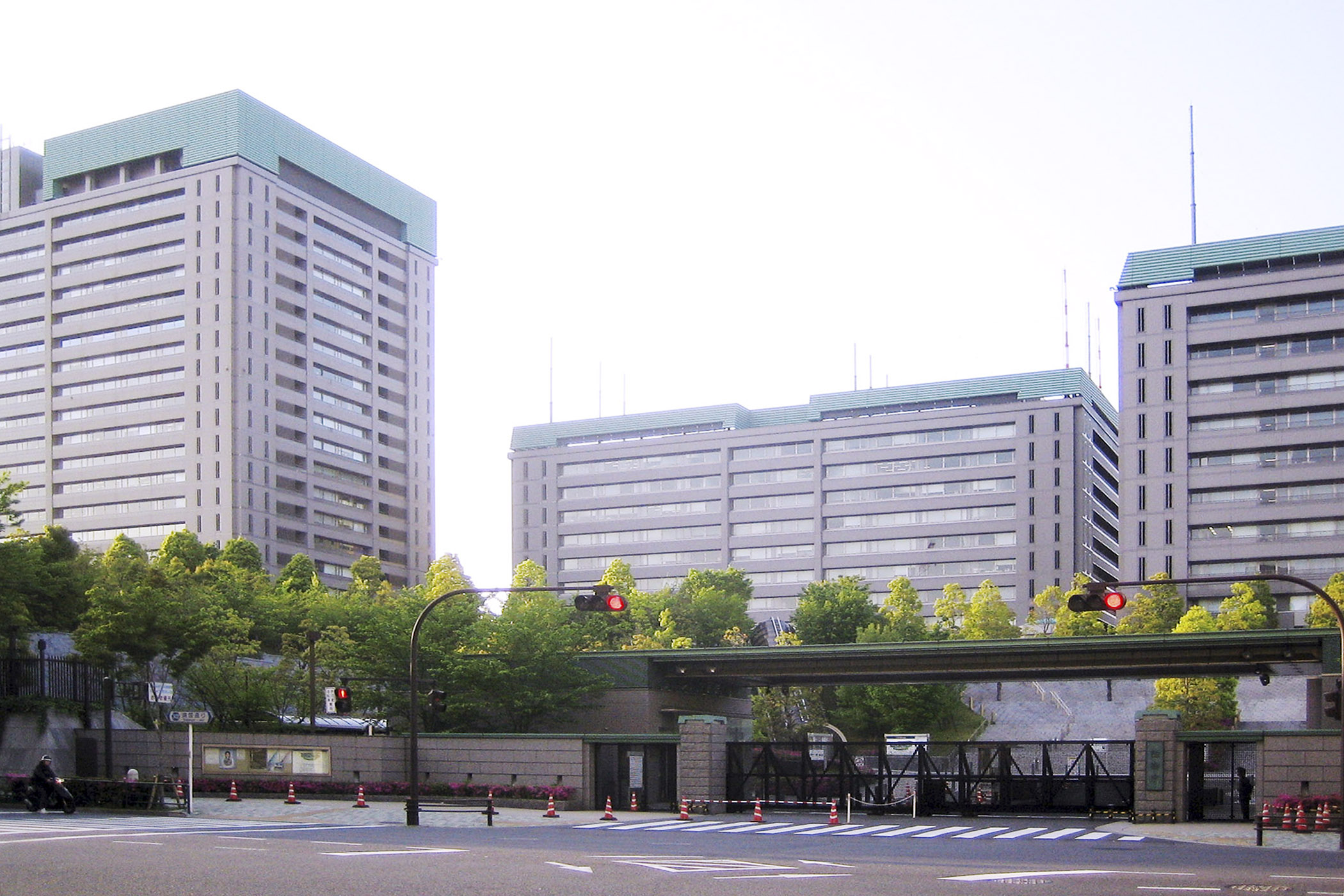 Japan Defense Agency (防衛庁 Bōeichō), a in Shinjuku, Tokyo, Japan